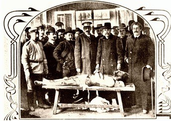 Врачи над телом Георгия Гапона 1 мая 1906 года в Озерках